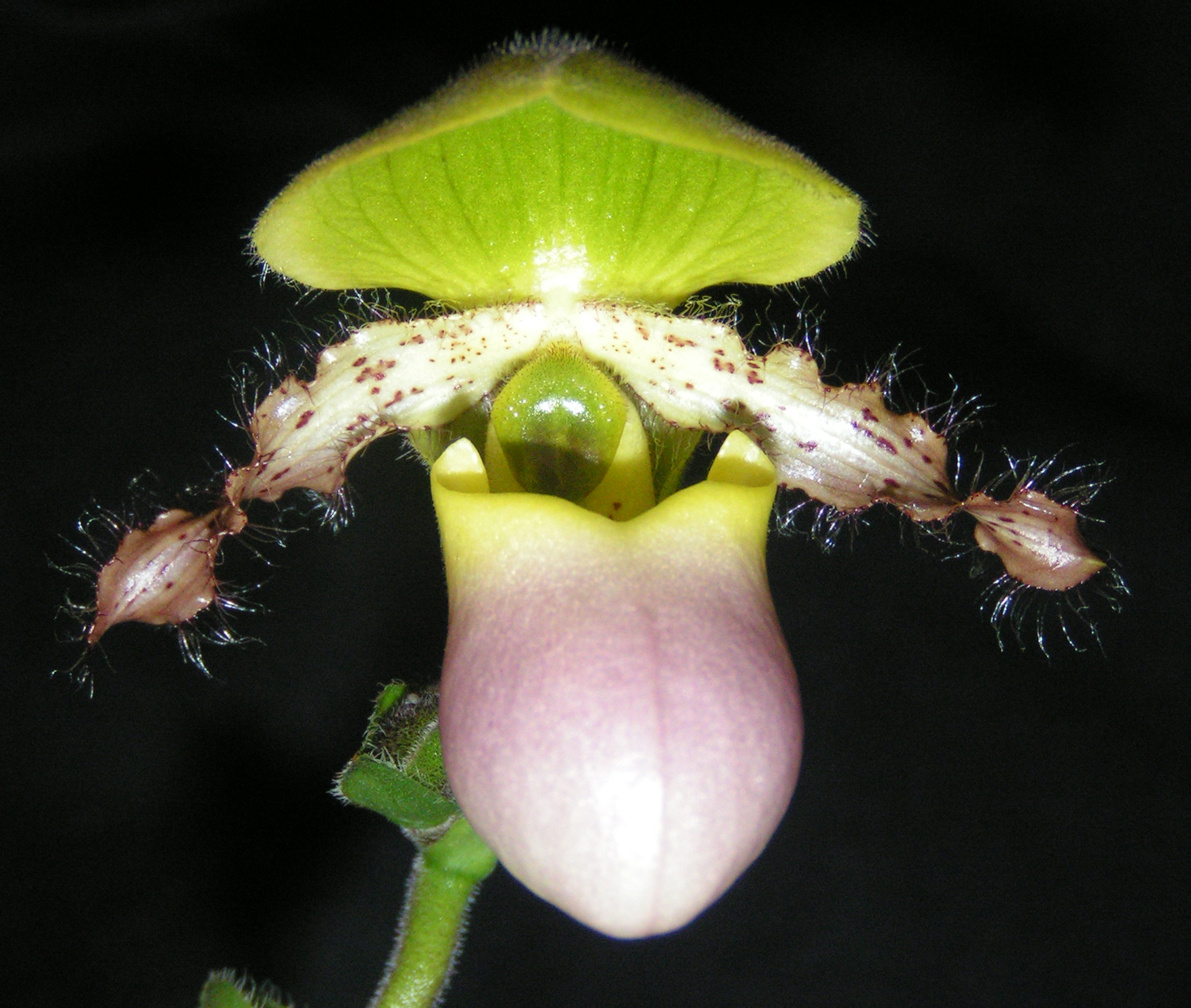 Flos Paphiopedili primulini purpurascentis